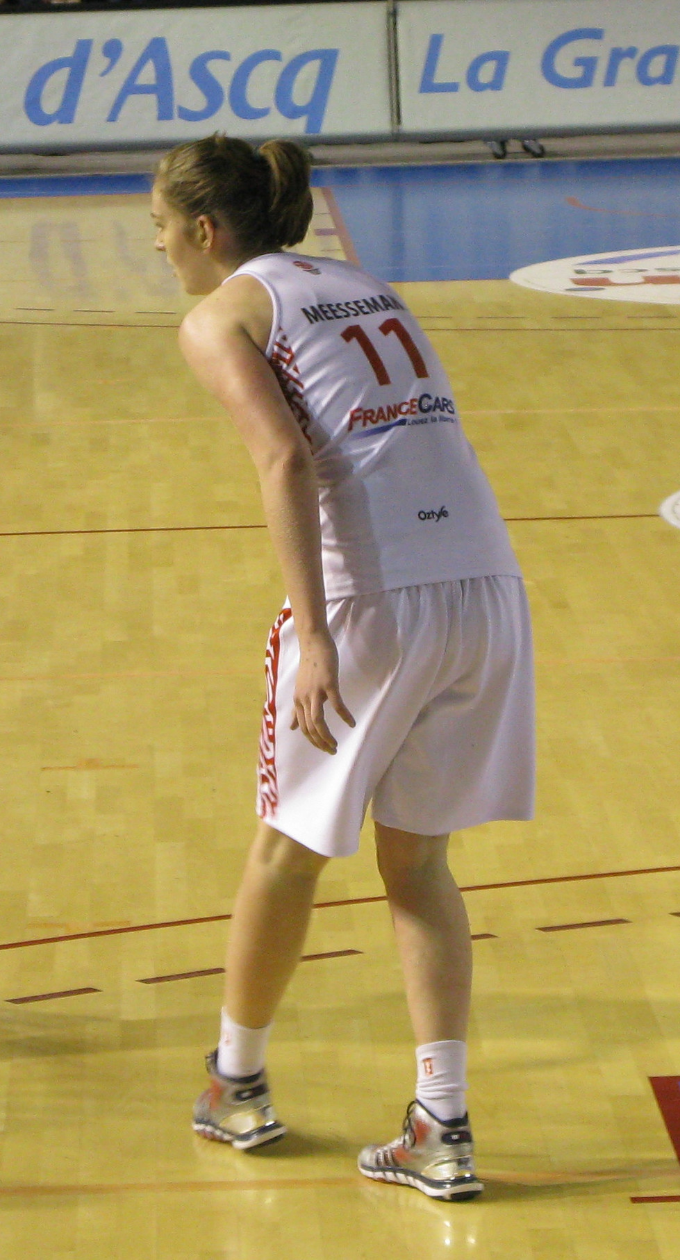 Emma Meesseman au Palacium, lors du match ESBVA vs Saint-Amand Hainaut, championnat LFB.